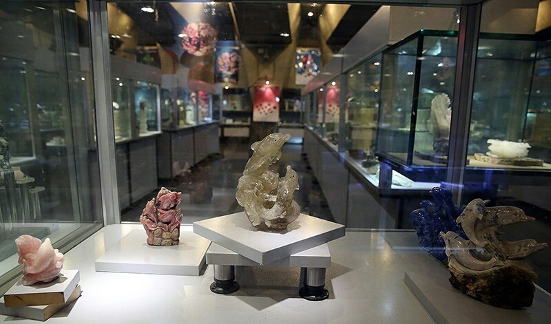 موزه سنگ و گوهر - مجموعه فرهنگی هنری برج آزادی - ۱۳۹۲